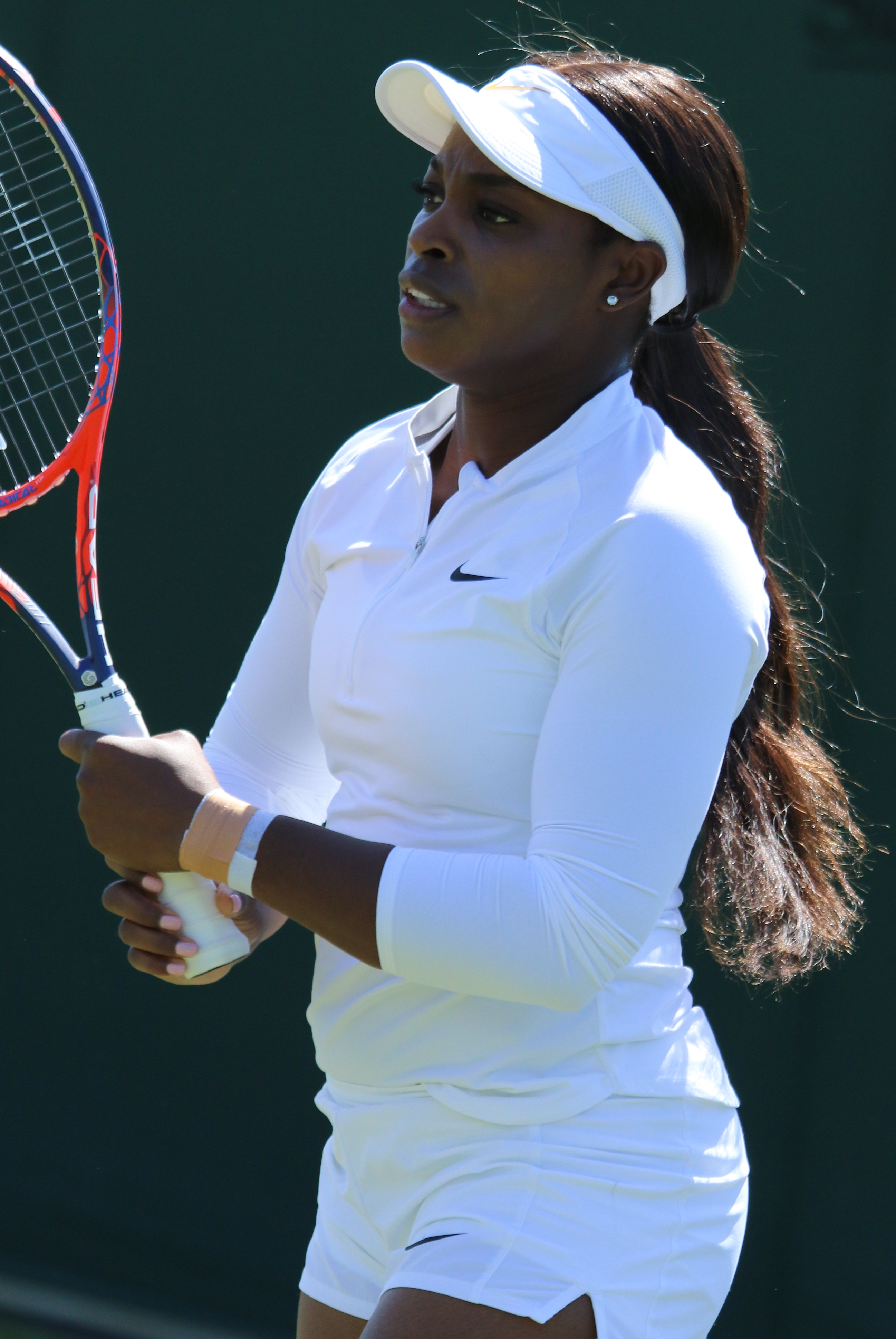 Stephens WM18 (17)